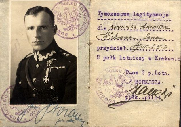 Legitymacja Jana Schrama